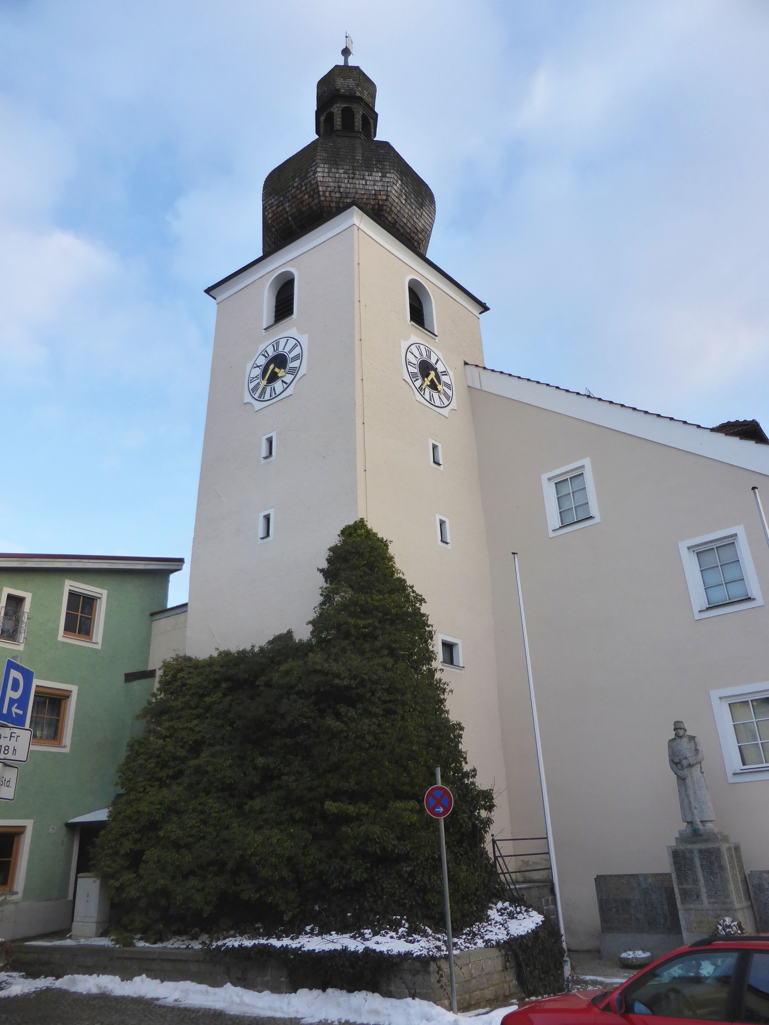 Neukirchen_beim_Heiligen_Blut_(Marktplatz_10